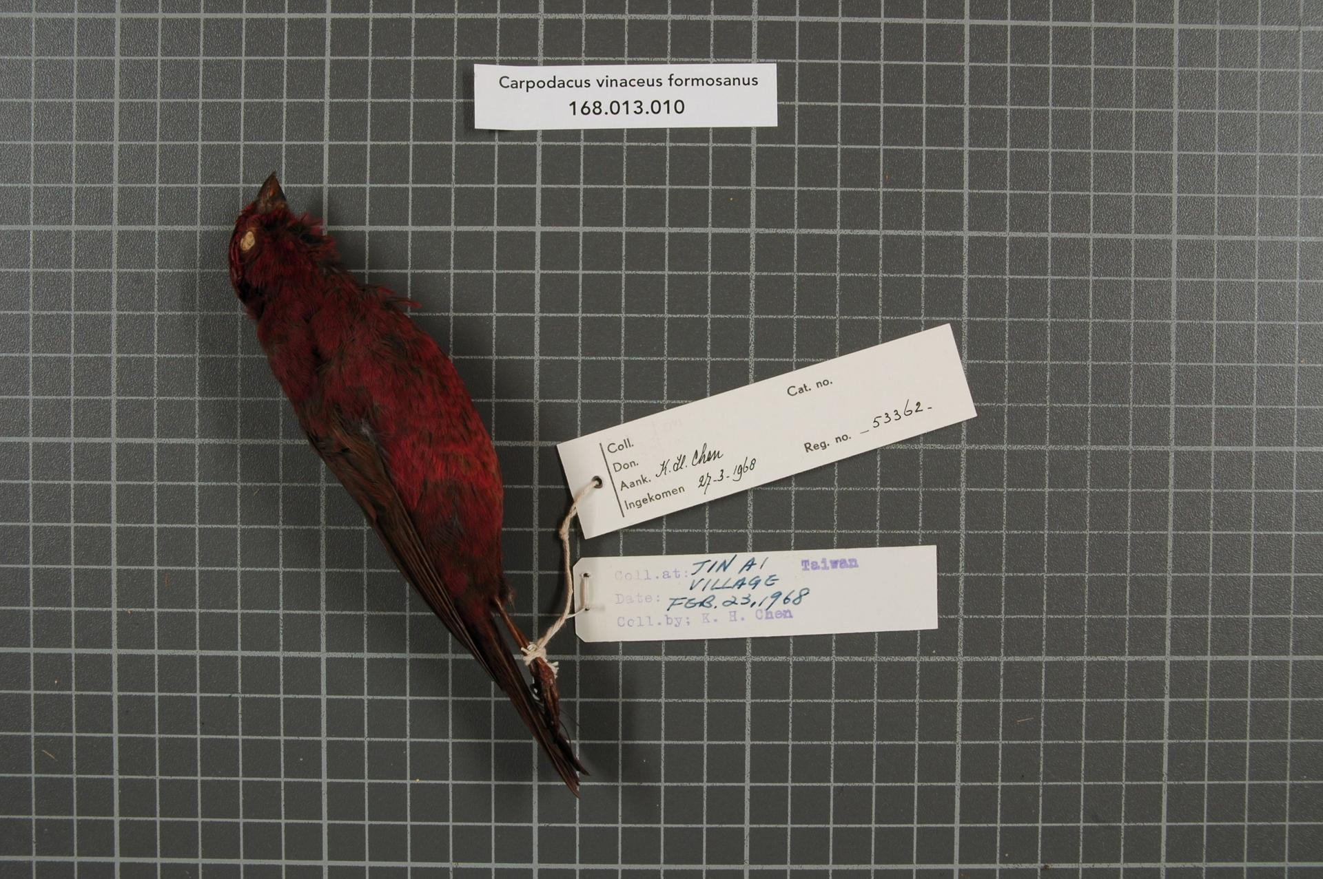 Carpodacus vinaceus formosanus Ogilvie-Grant, 1906